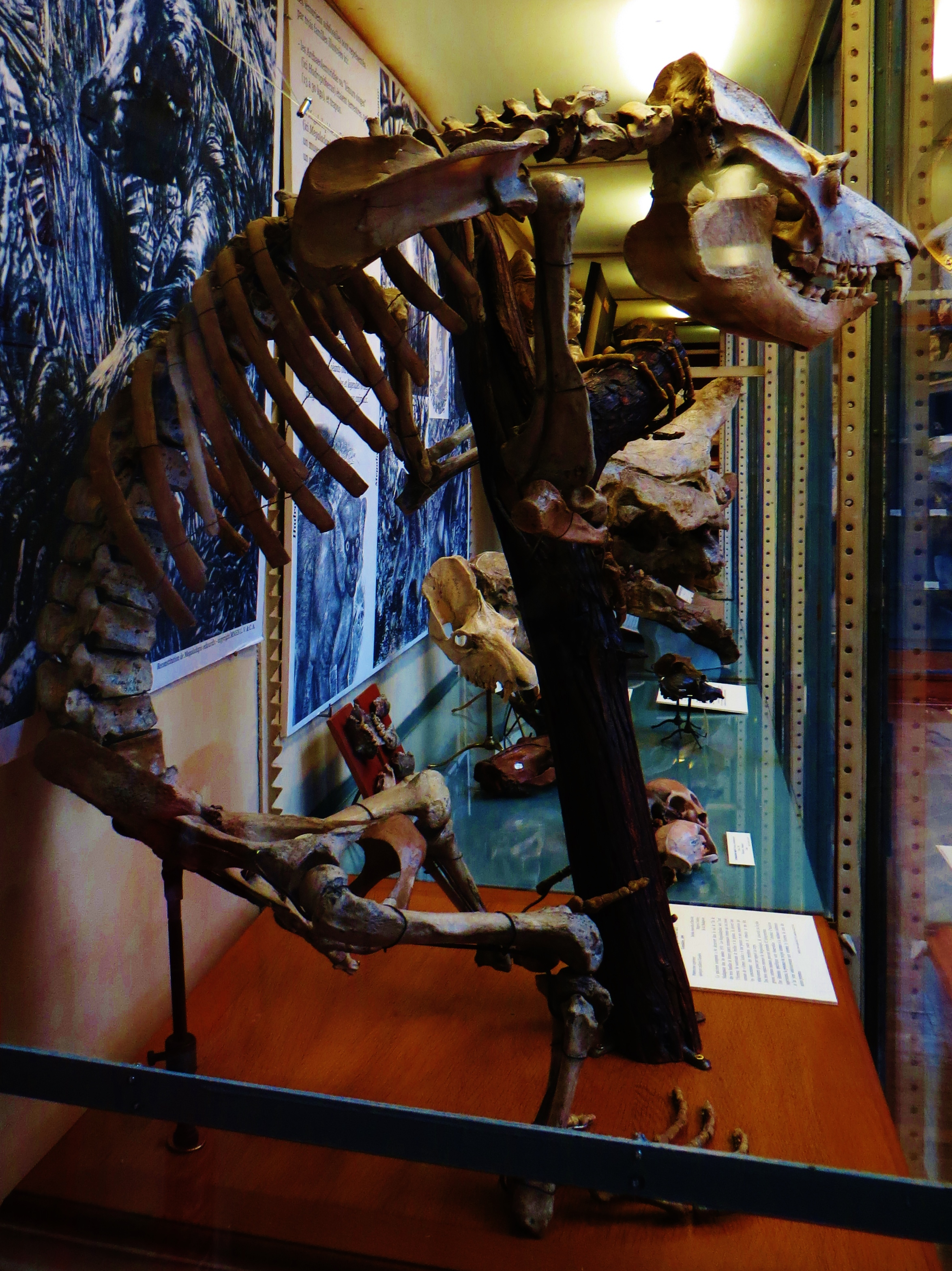 Fossil of Megaladapis, an extinct mammal- Took the photo at Musee d'Histoire Naturelle, Paris